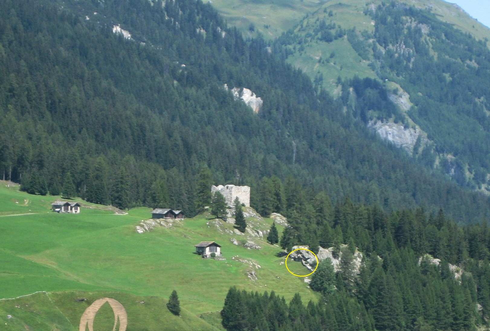 Sperrstelle Splügen Dorf, Splügen GR, Schweiz